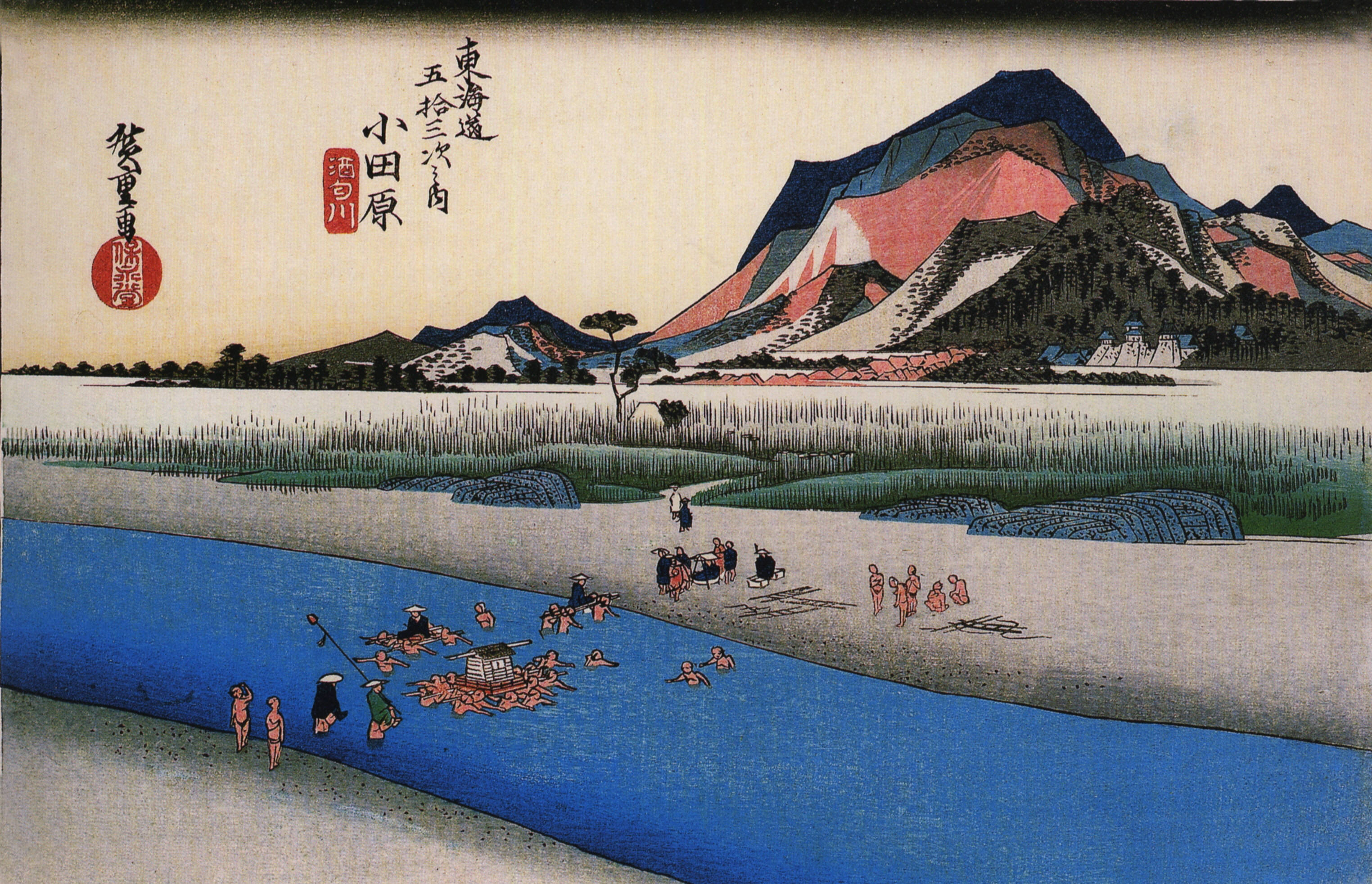 "Tokaido-53tugi Odawara",ukiyo-e by Hirosige.